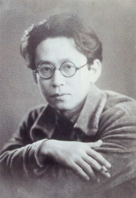 Funayama Kaorru (Japanese, *1914, †1981)